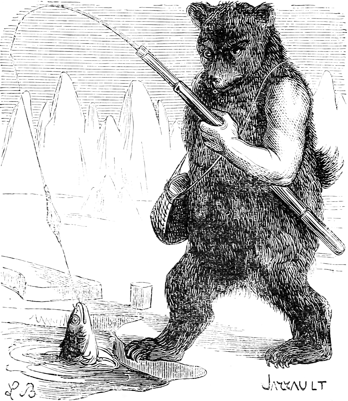 Une illustration pour l’article Tables tournantes dans le Dictionnaire infernal par Collin de Plancy.